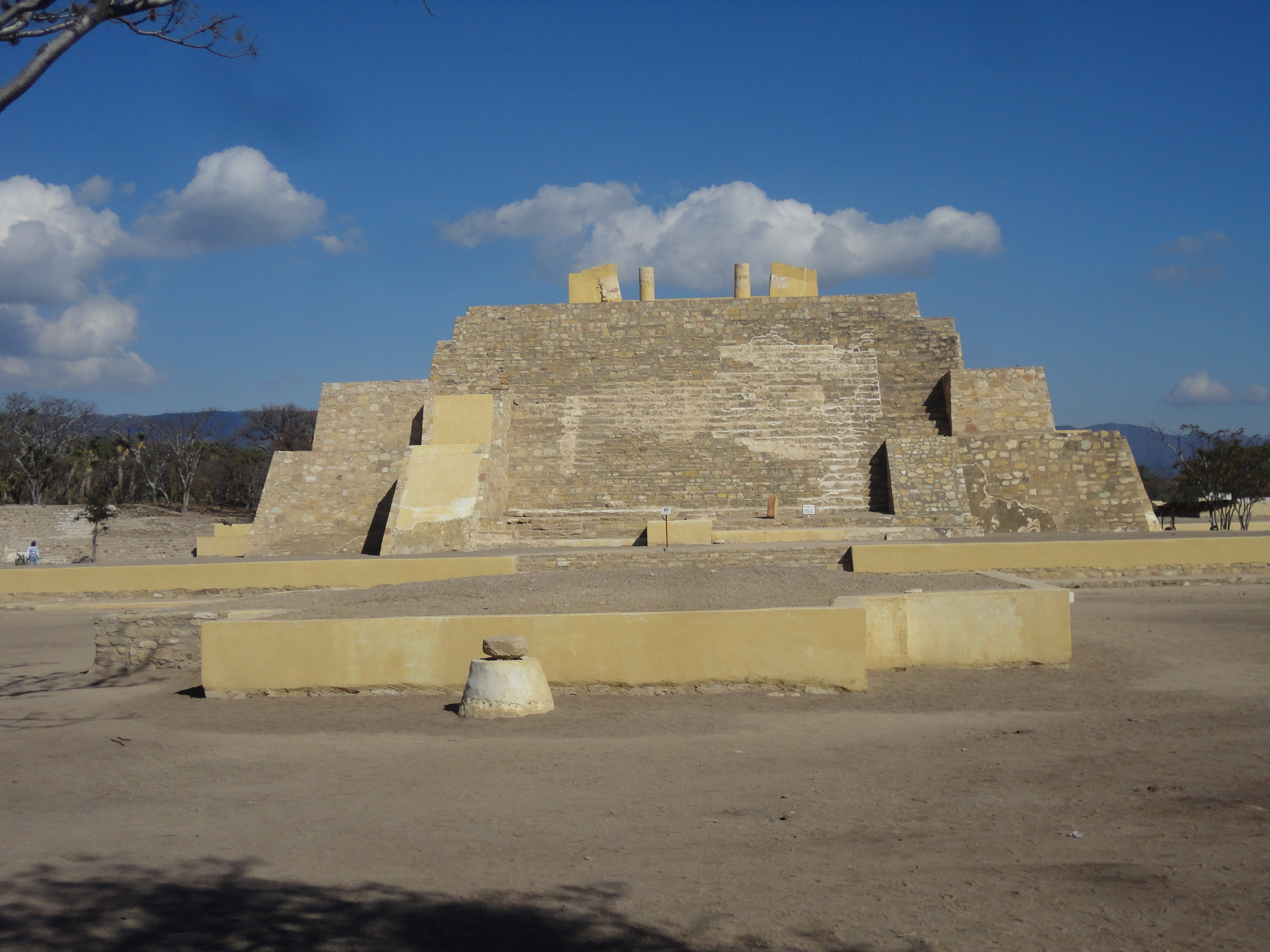 Templo Mayor (Zona Arqueologica La Mesa Tehuacan,Puebla).